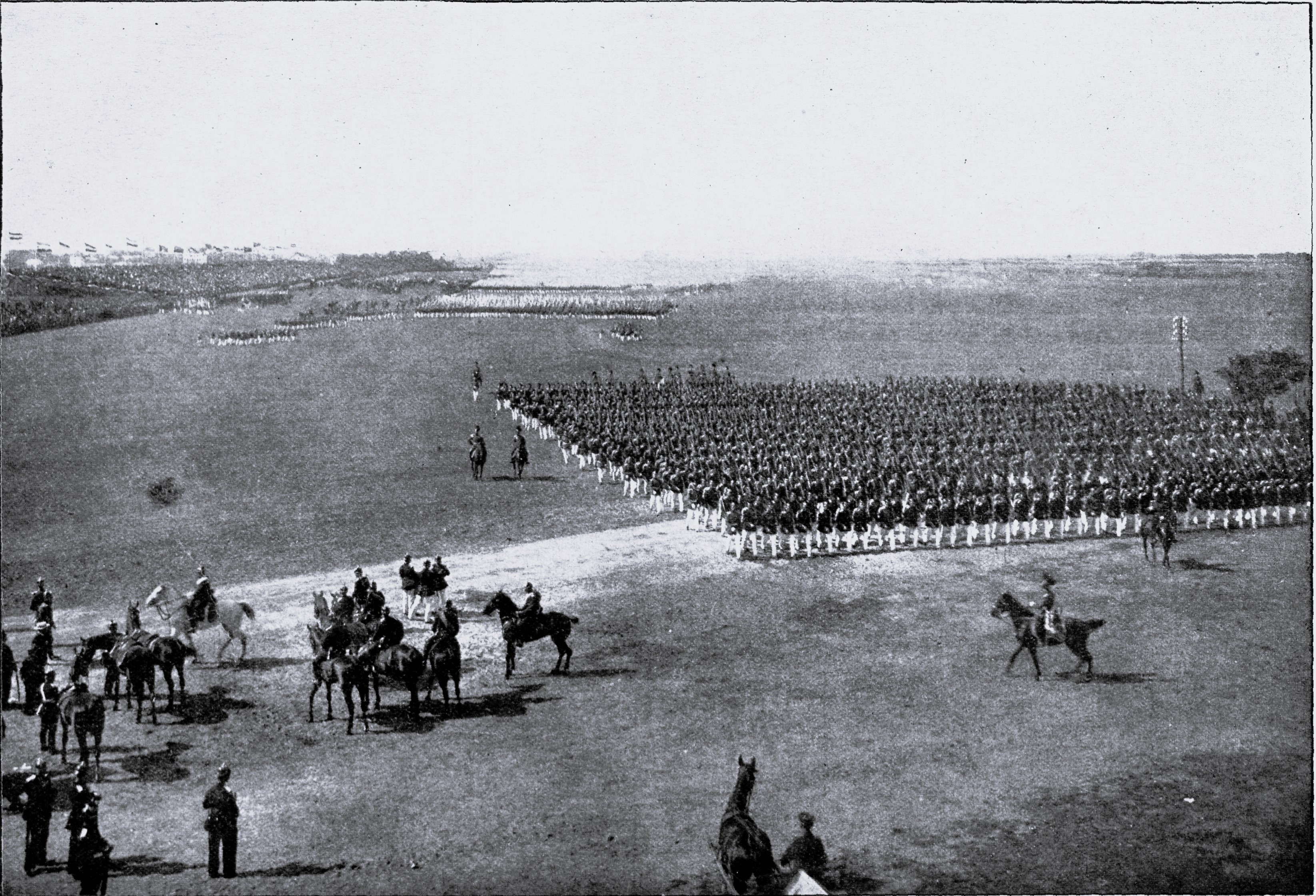 Kaiserparade zu Altona am 5. September 1904. Vorbeimarsch der Infanterie in Regiments-Kolonnen vor Se. Majestät dem Kaiser auf dem Paradefeld beim Hünengrab in Lurup